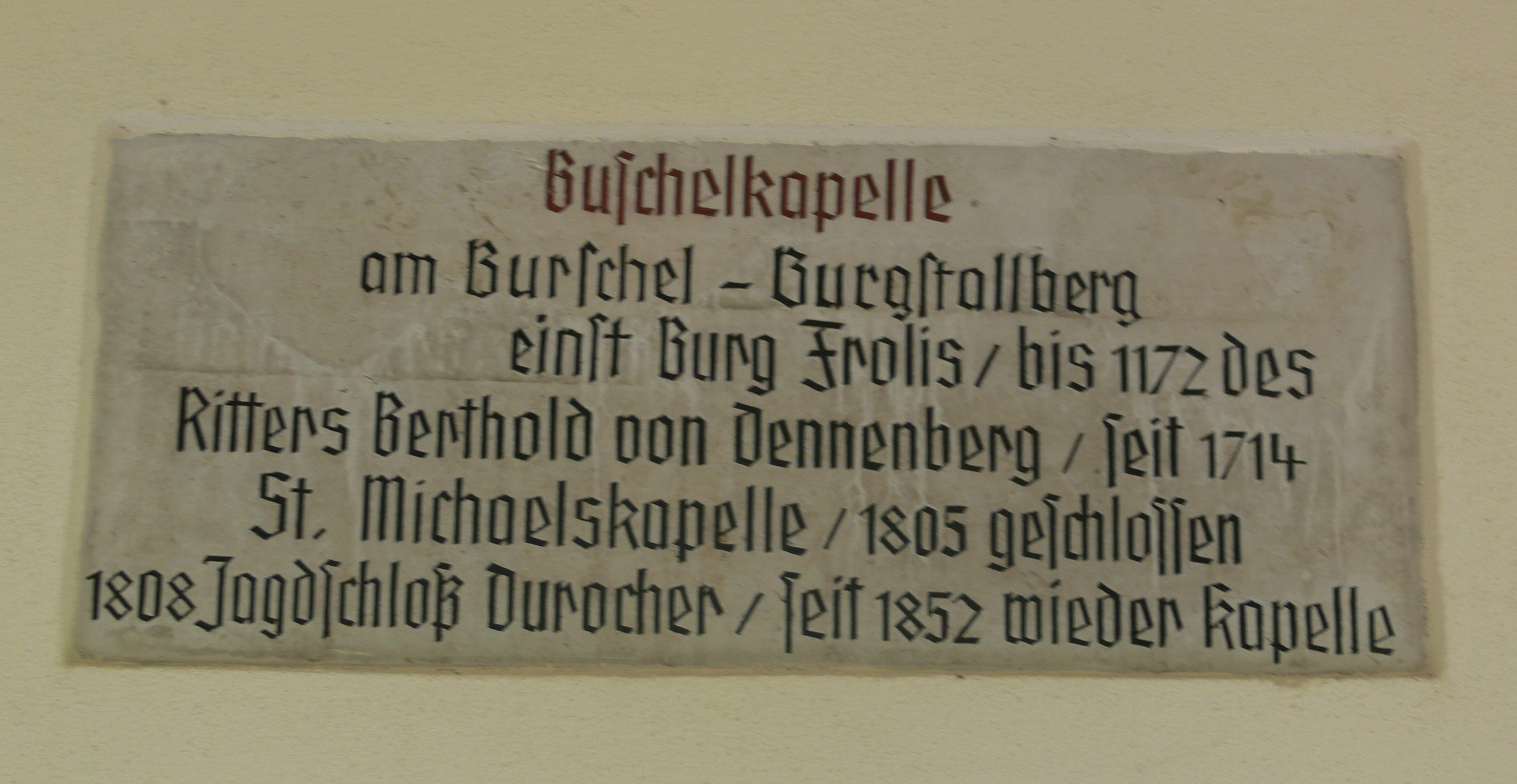 Tafel an der Buschelkapelle Ottobeuren